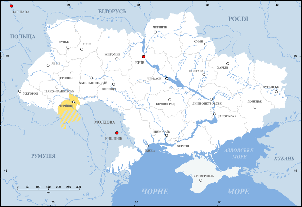 Буковина